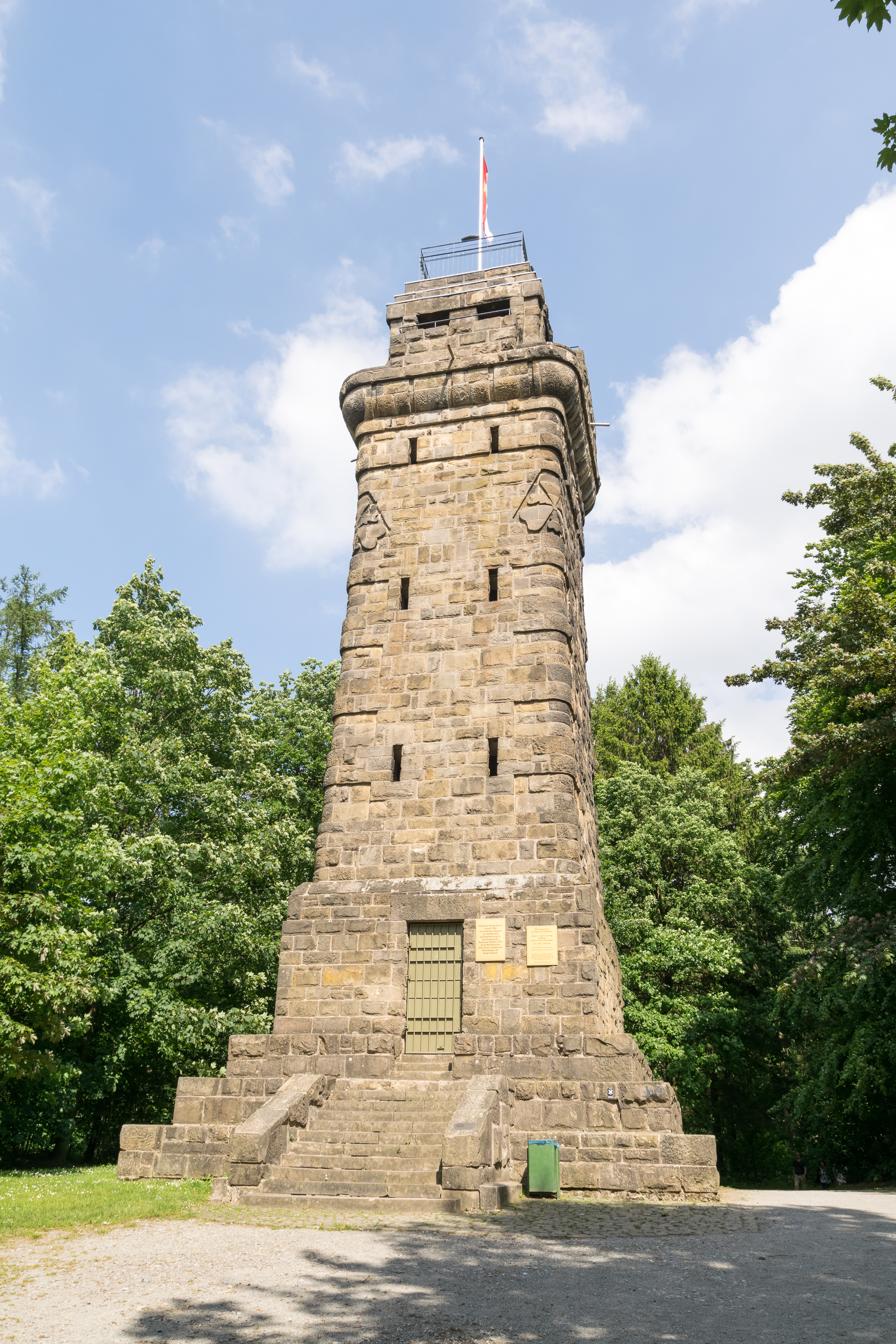 Der Bimarckturm auf dem Stuckenberg bei Herford